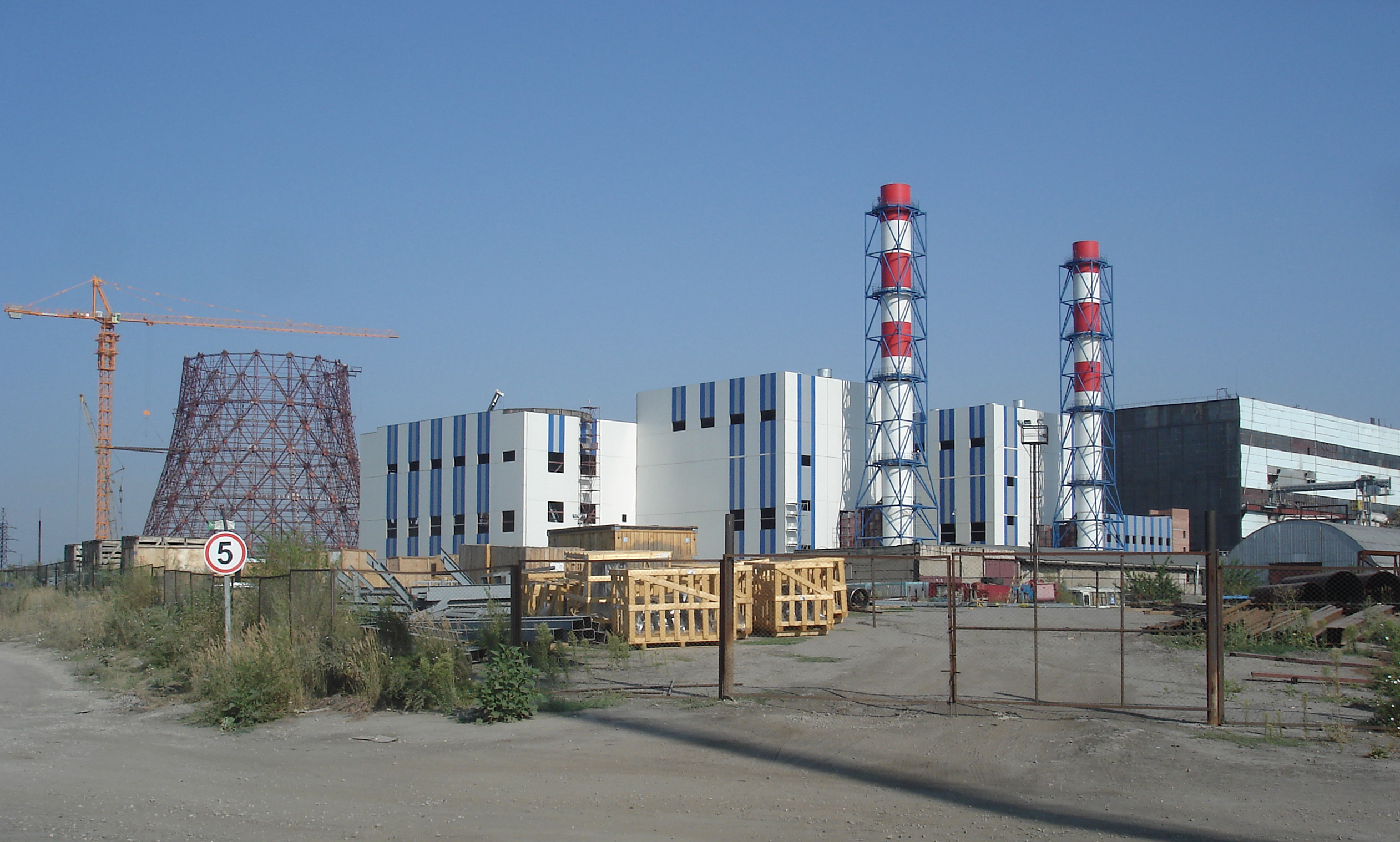 вид на строящиеся здания новых блоков станции и каркас градирни